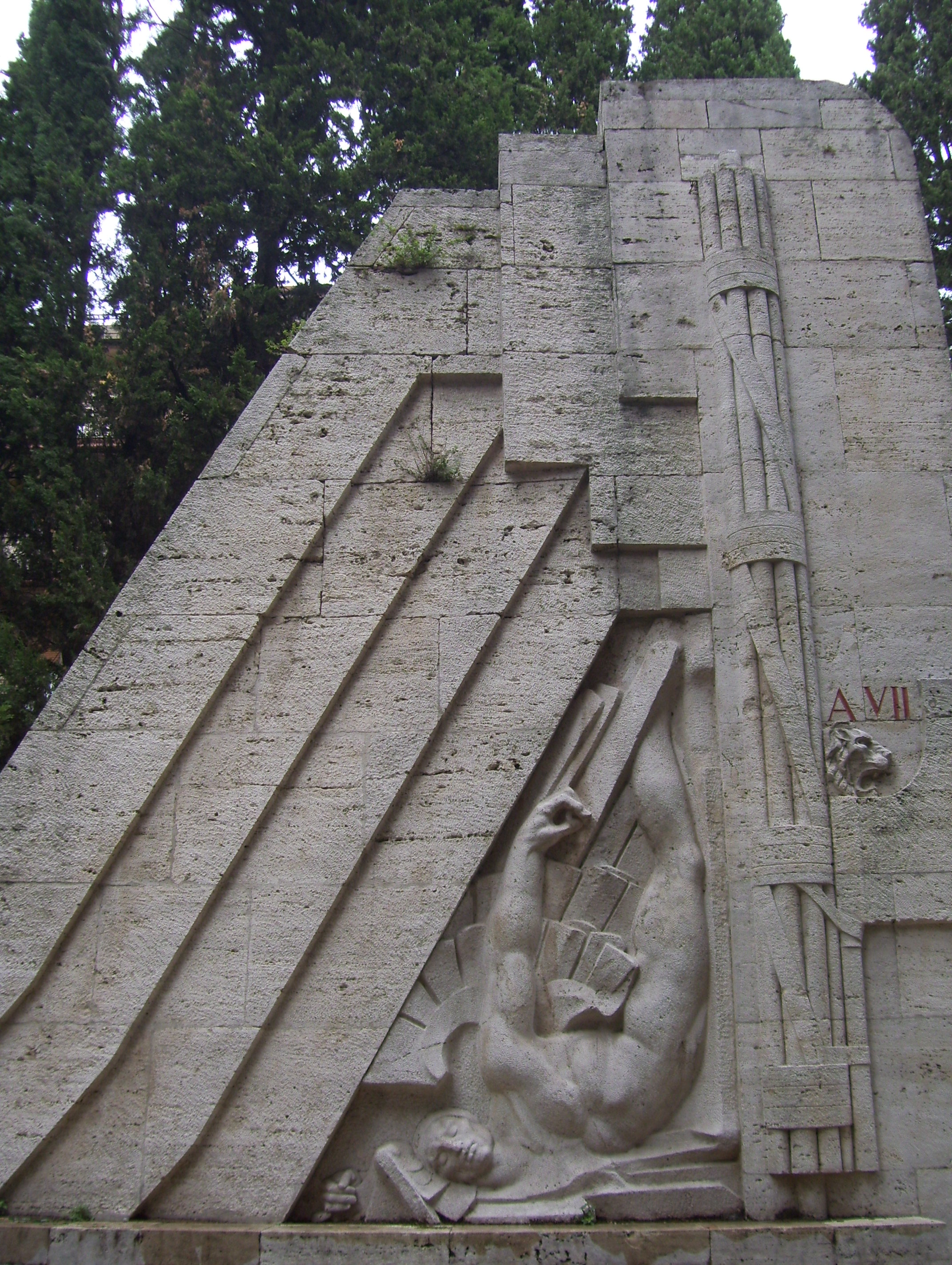 Monumento ad Alessandro Guidoni, dettaglio. Guidonia Montecelio.